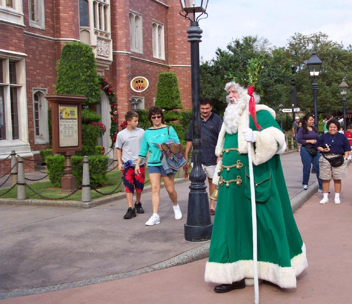 UK Santa.